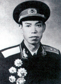 梁兴初将军1955年受勋照